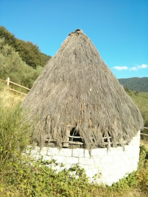 Recreación chozo como los usados por los pastores trashumantes